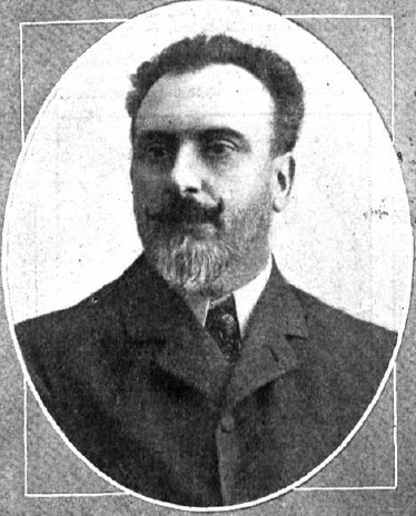 Fotografía del periodista español y director de El Liberal Alfredo Vicenti publicada en 1912